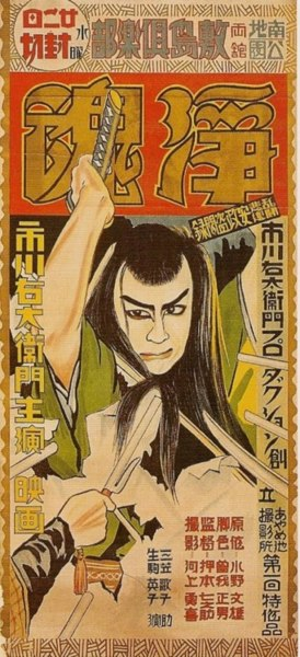 『淨魂』、1927年公開時のポスター